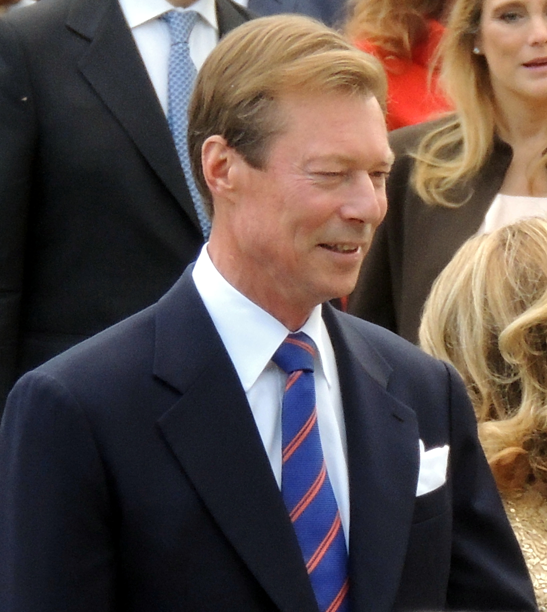 De Grand-Duc nom zivile Bestietnes vum Ierfgroussherzog Guillaume mat der Stéphanie vu Lëtzebuerg.